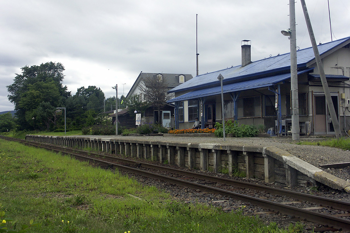 境野駅ホーム